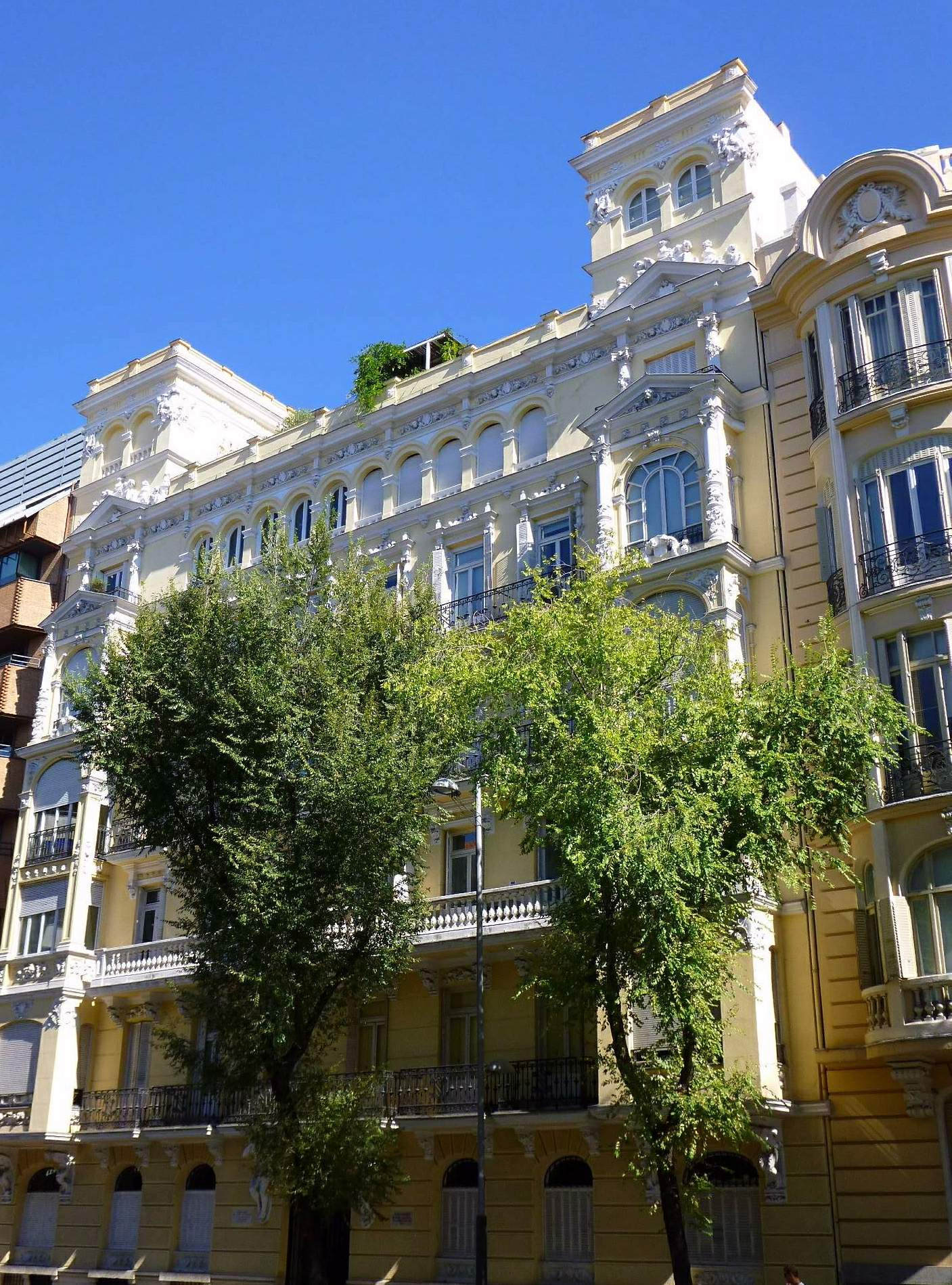 Edificio Julián Martínez Mier, en la calle Almagro de Madrid